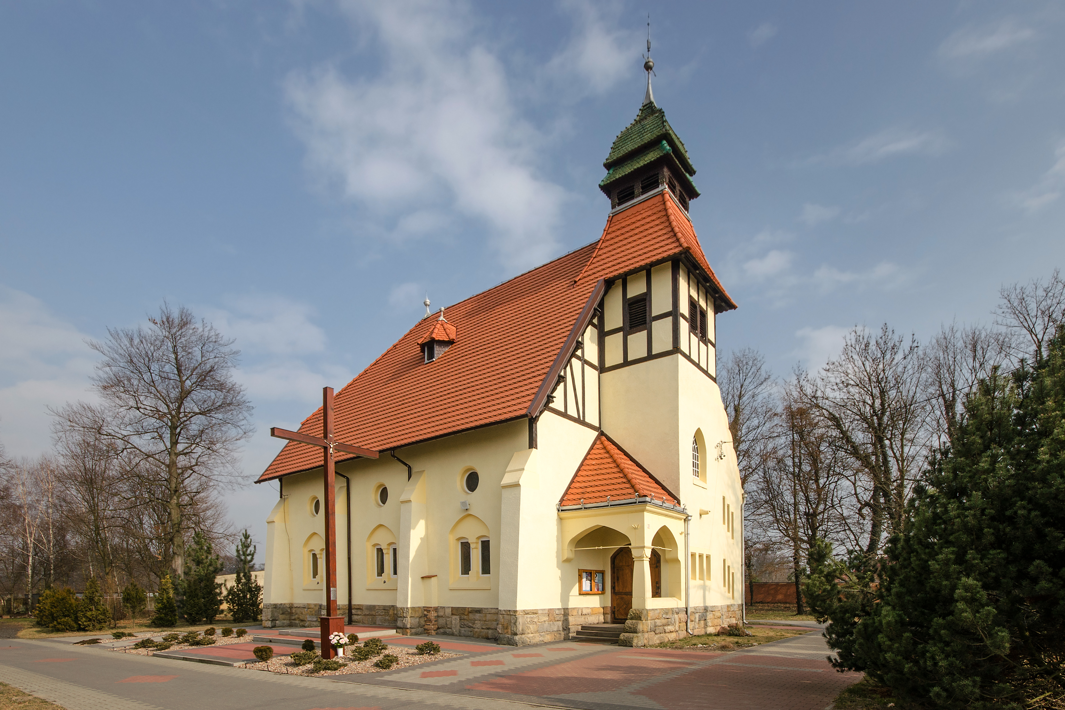 Kościół św Bartłomieja w Stradomii Wierzchniej, woj. dolnośląskie, pow. oleśnicki, gm. Syców